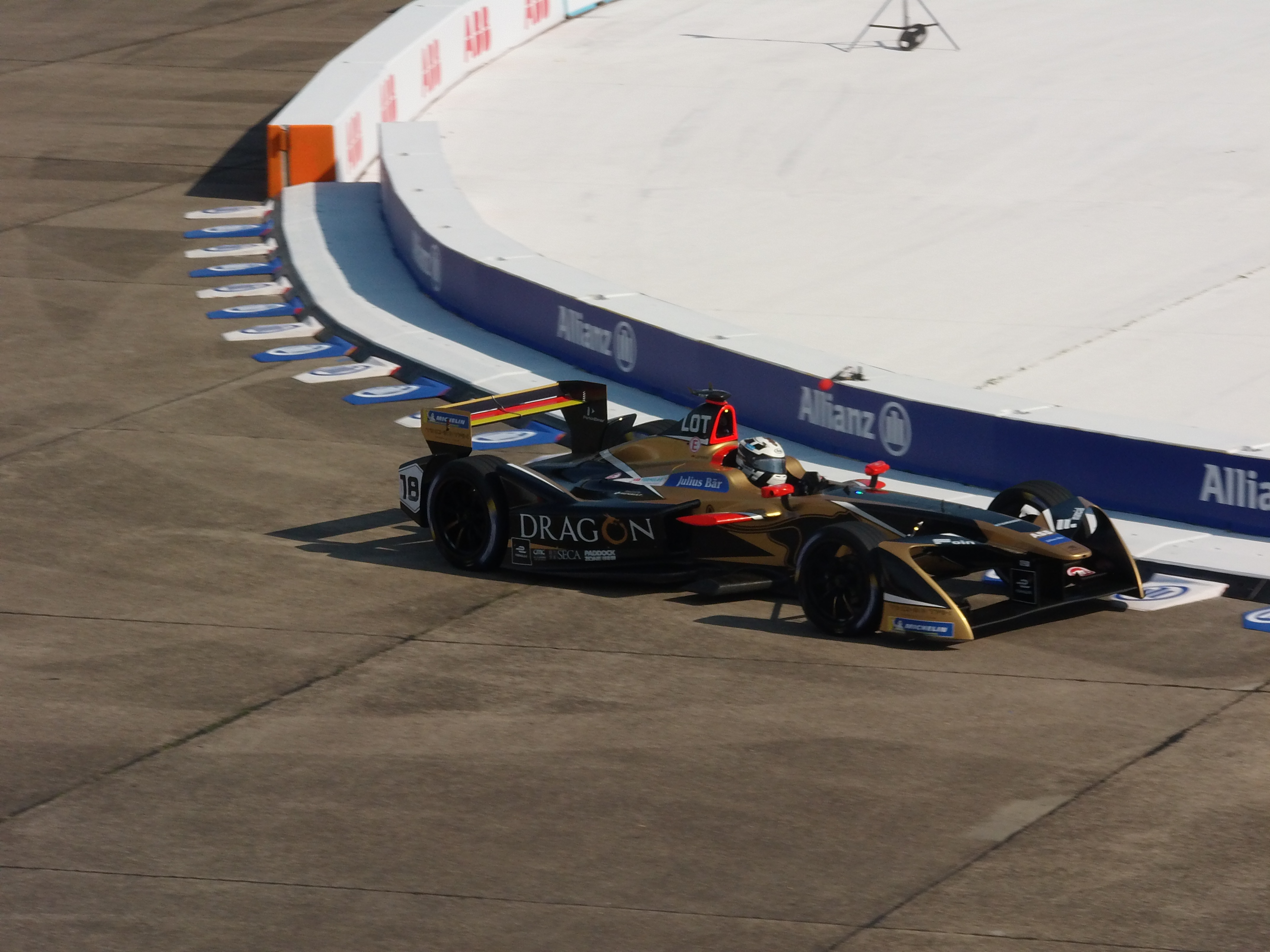 Adré Lotterer im Renault Z.E.17 beim Berlin E-Prix 2018